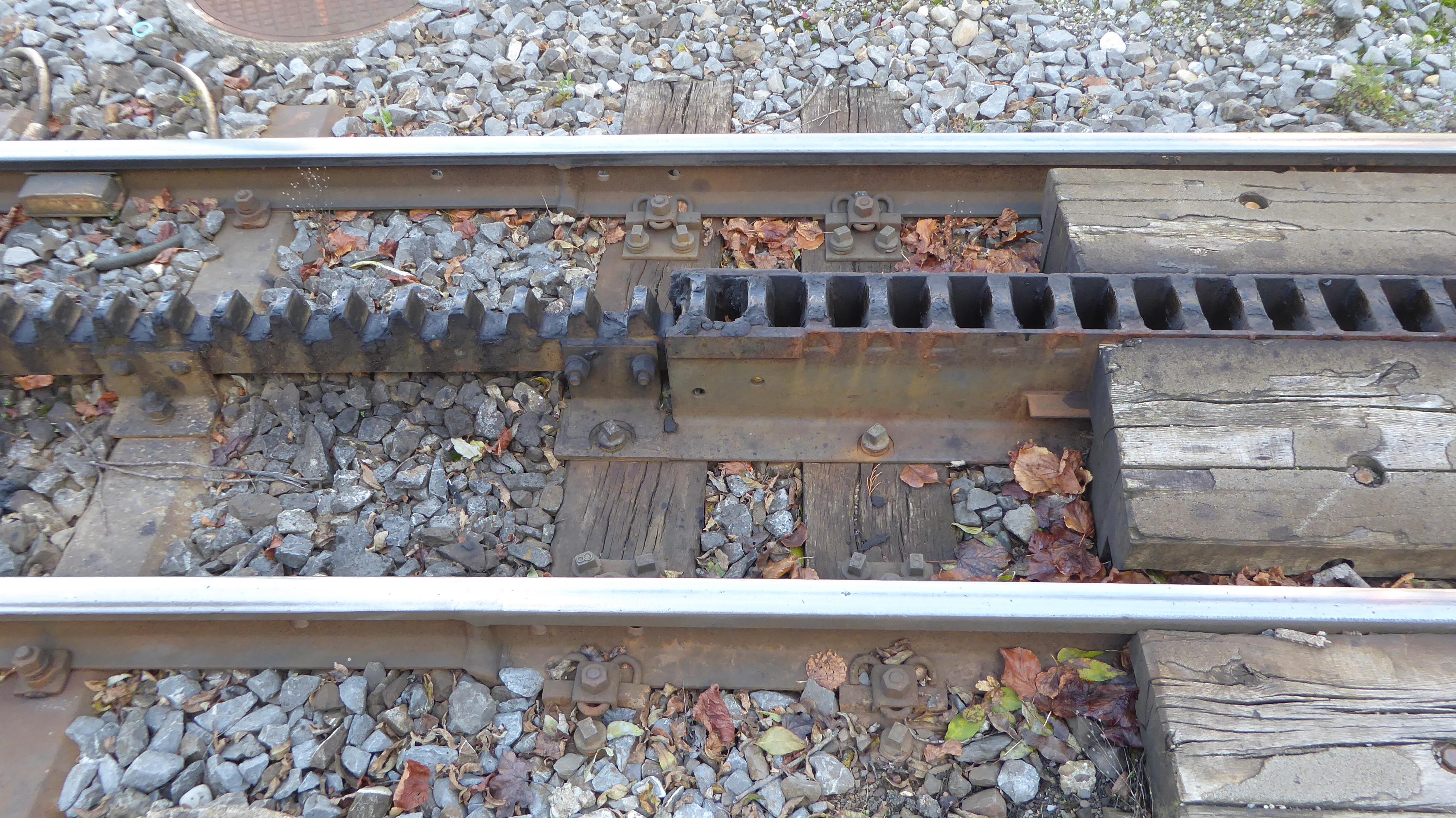 Übergang von der Von-Roll- auf eine Sonderkonstruktion einer Leiterzahnstange ohne Wangenüberhöhung für Bahnübergänge. Übergang Hochwachtstrasse auf dem letzten Zahnstangenabschnitt der Strecke St. Gallen–Gais–Appenzell der Appenzeller Bahnen (AB).